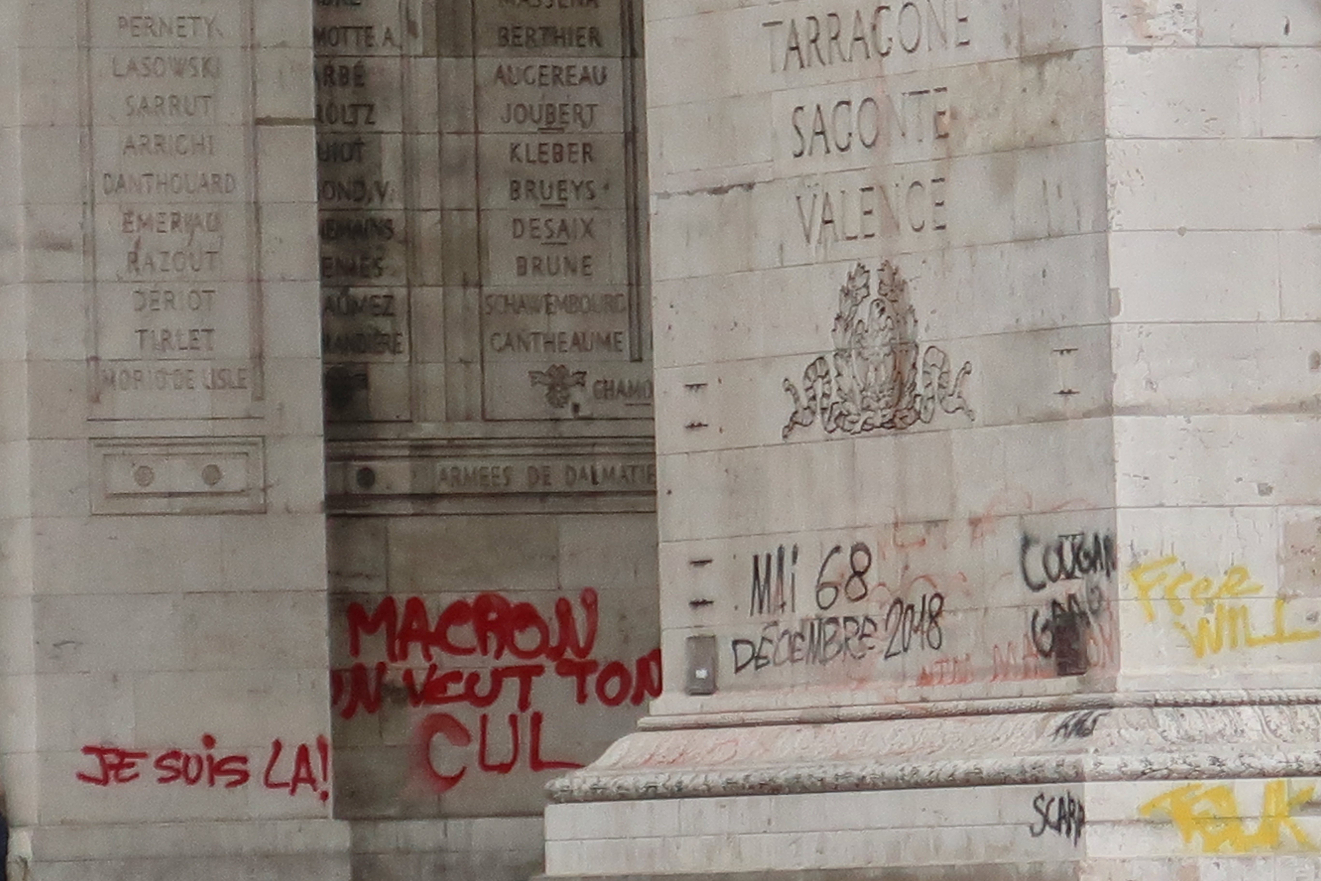 Arc de Triomphe, place Charles-de-Gaulle (Paris). Photo prise le lendemain de la manifestation du mouvement des Gilets jaunes du 1er décembre 2018.